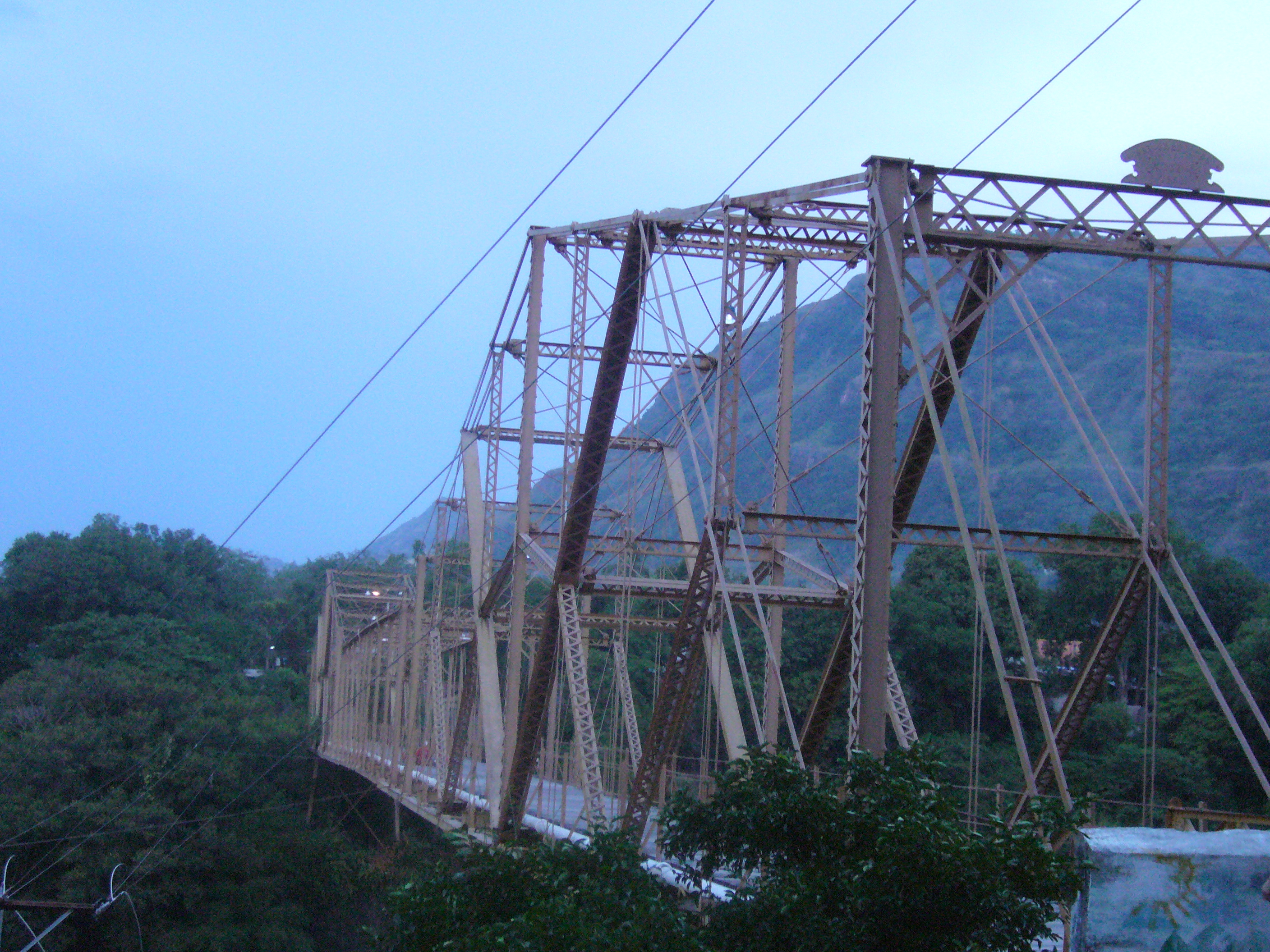 Vista lateral Puente Navarro, Honda (Colombia)